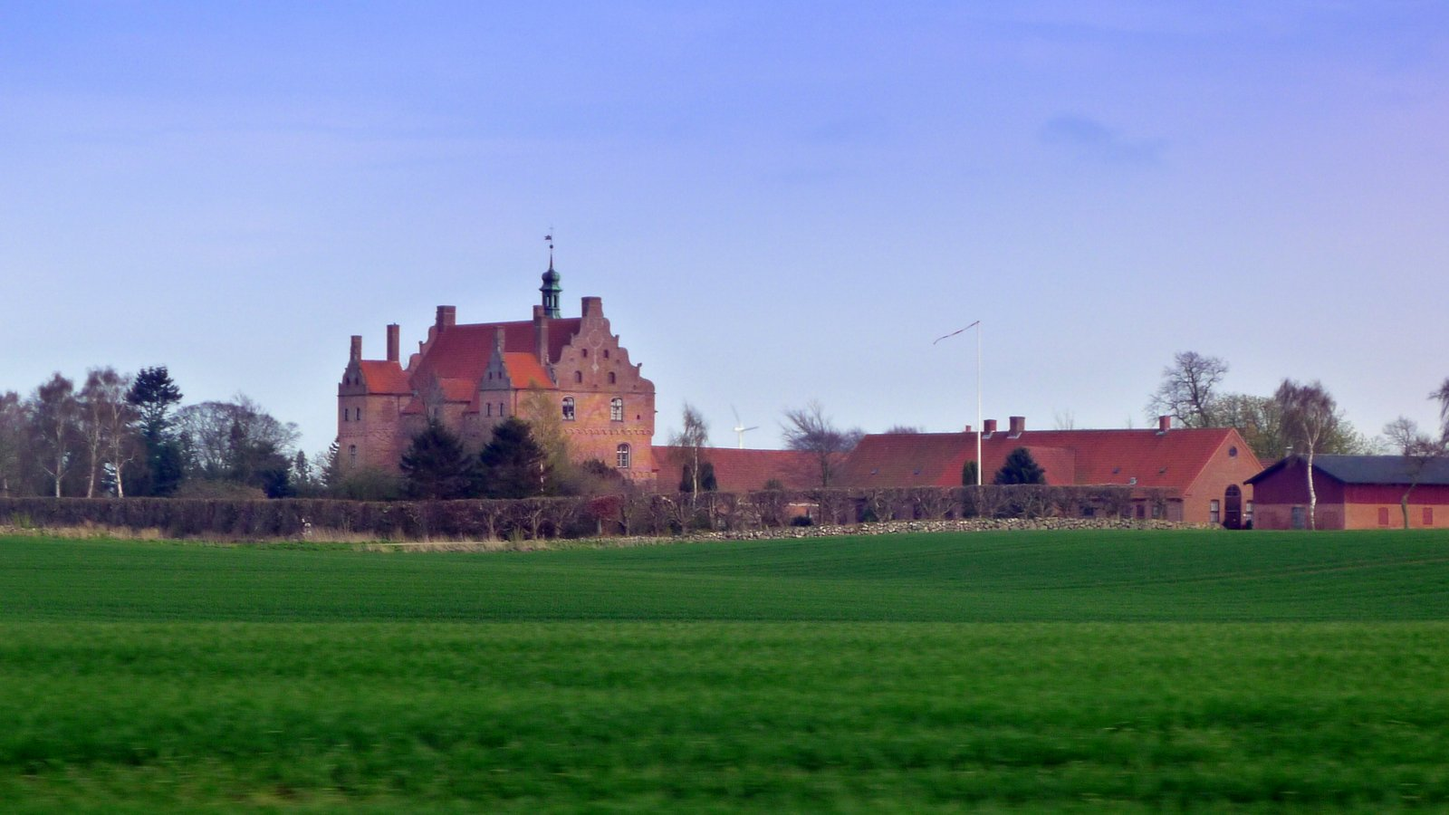 Ørbæklunde Gods syd for Ørbæk, set fra vejen april 2012 Kulturarv ID 450-10254-10